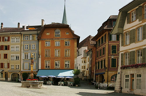 Biel: Burgplatz mit Gerechtigkeitsbrunnen